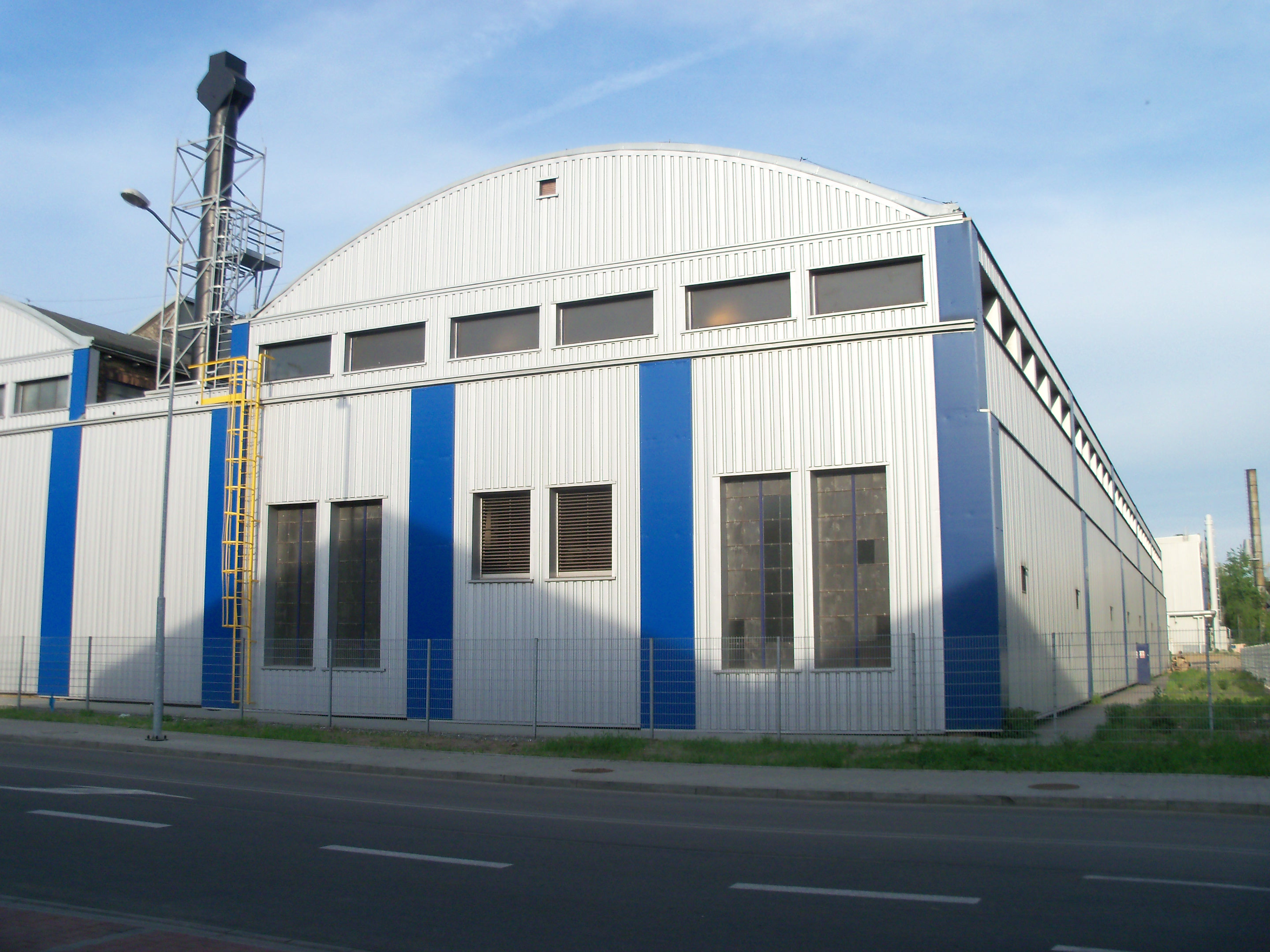 Huta Baildon w Katowicach